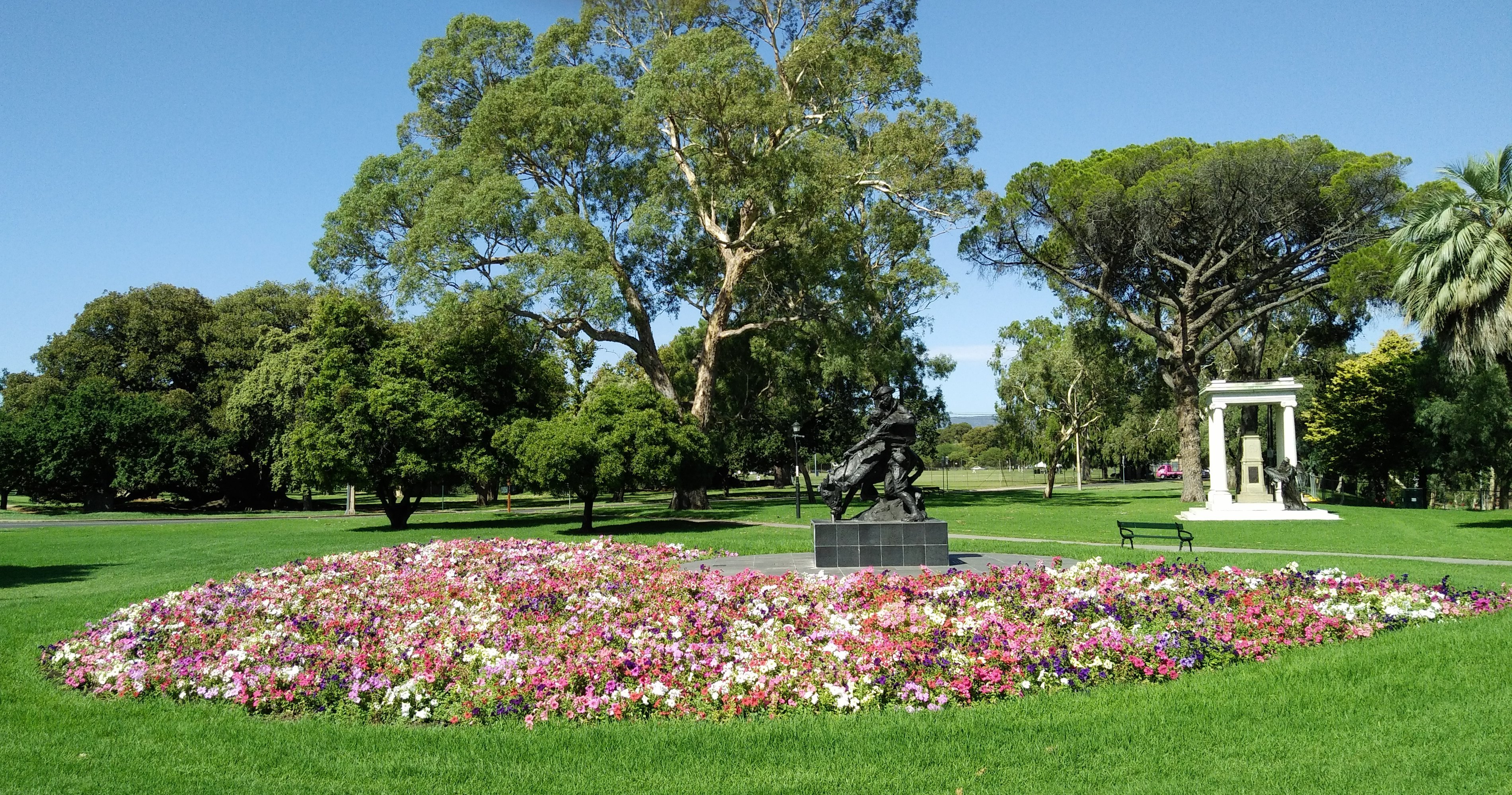 Angas Gardens (Adelaide Park Lands)